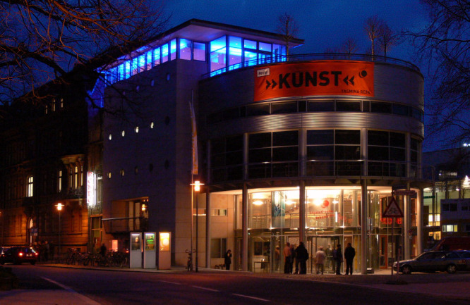 Staatstheater Braunschweig, Kleines Haus, nachts